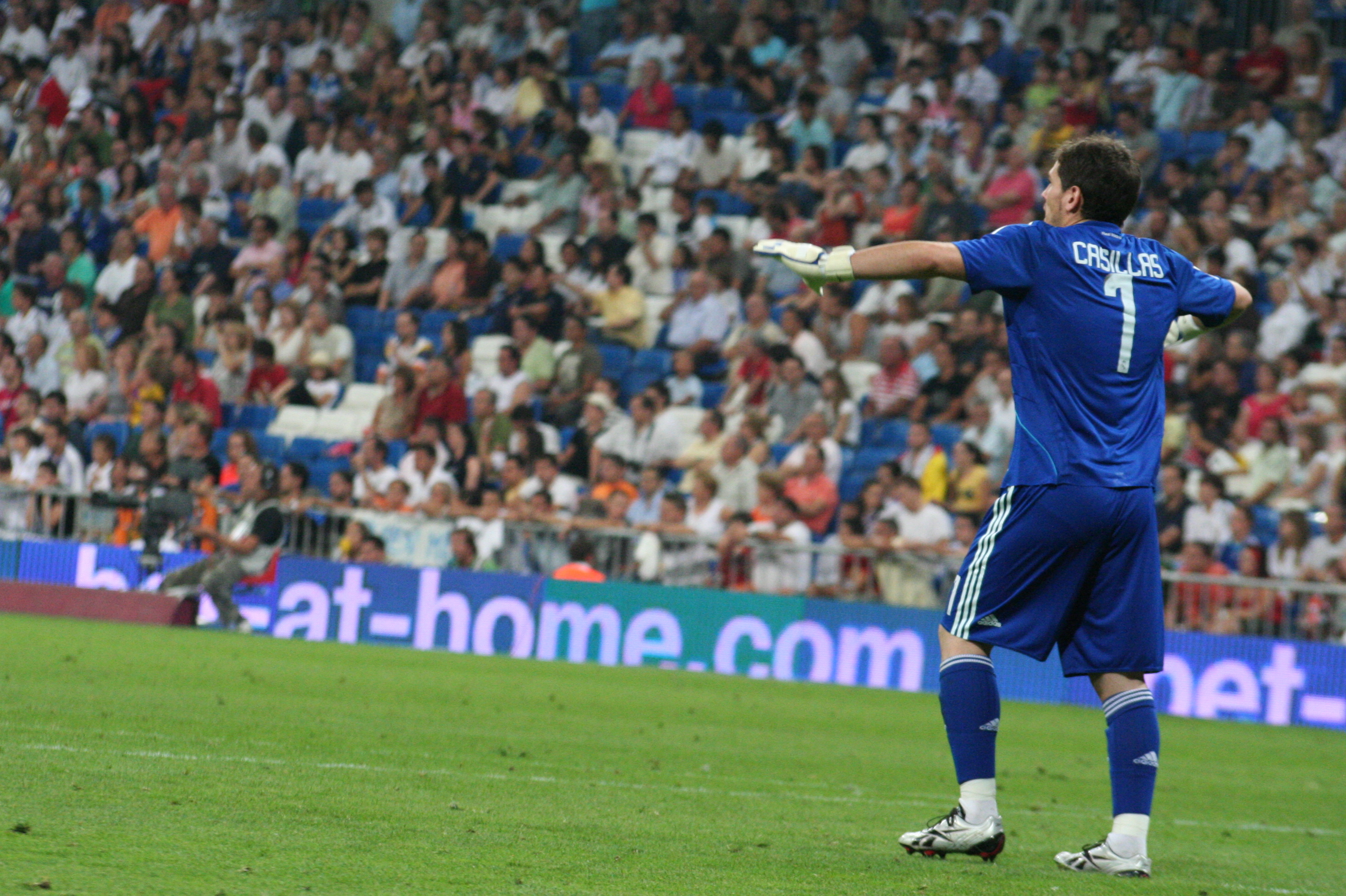 Iker Casillas